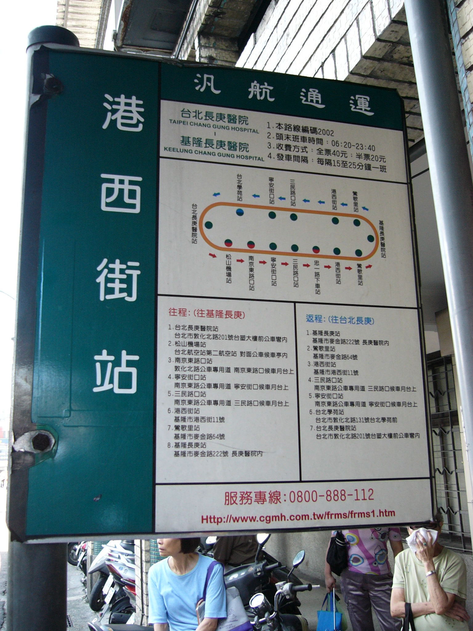 基隆市仁愛區港西街，汎航通運2002線「港西街站」站牌。